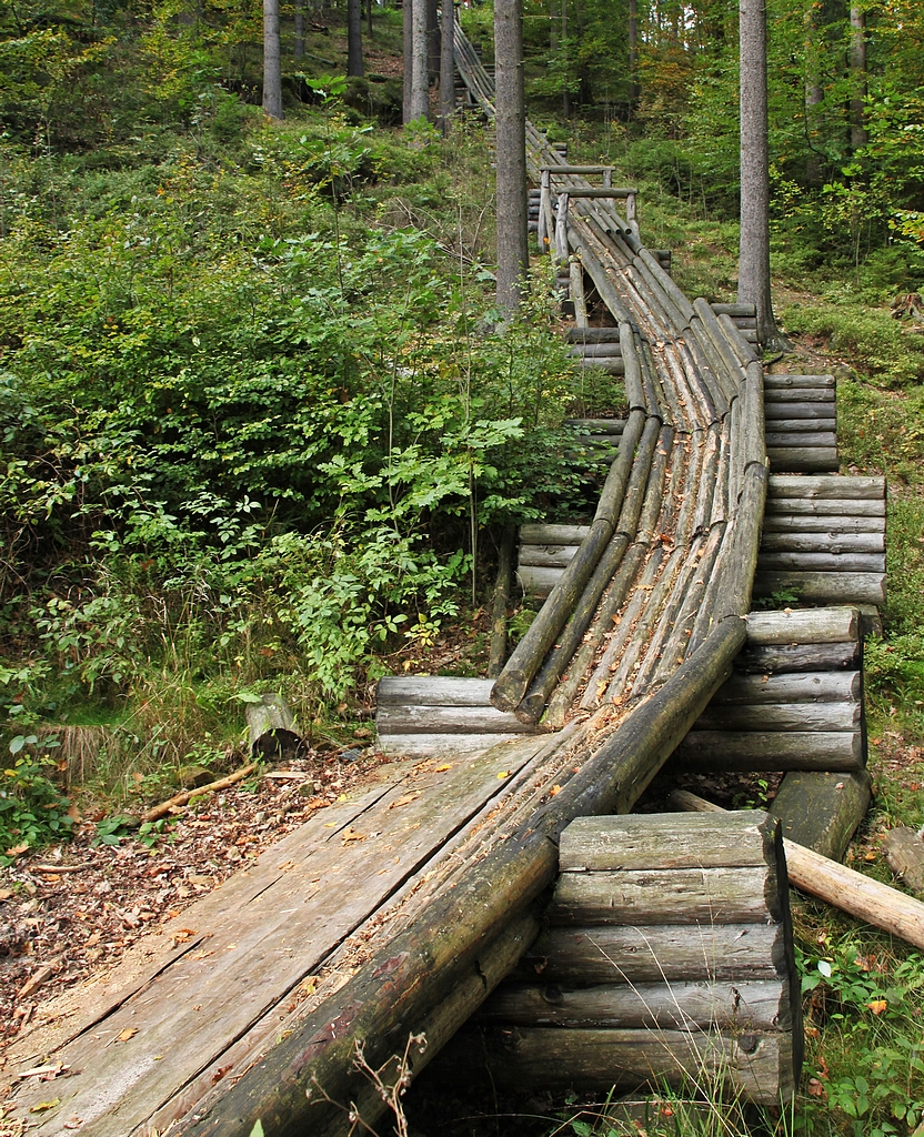 Hinterhermsdorf, Walderlebniszentrum "Waldhusche": Nachbau einer "Holzriese", einer rutschbahnartigen Rinne zum Abtransport geschlagenen Holzes aus steilem Gelände. Die "Holzriese" wird in Sachsen als "Husche" bezeichnet.